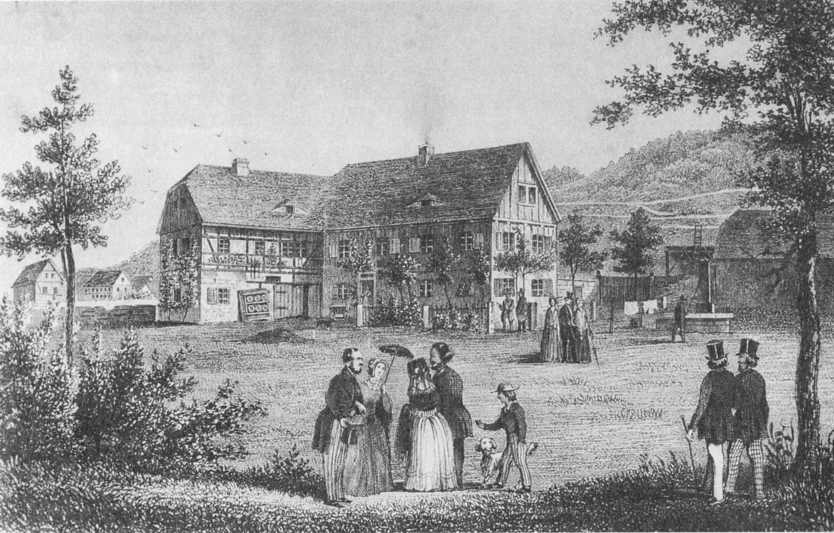 Carl Maria von Webers Landhaus in Hosterwitz bei Dresden, Dresdner Straße 22.